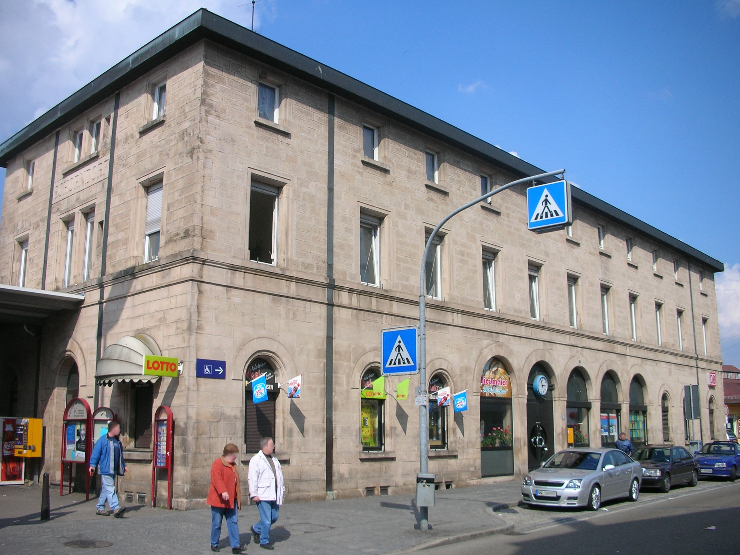 Schorndorfer Bahnhofsgebäude